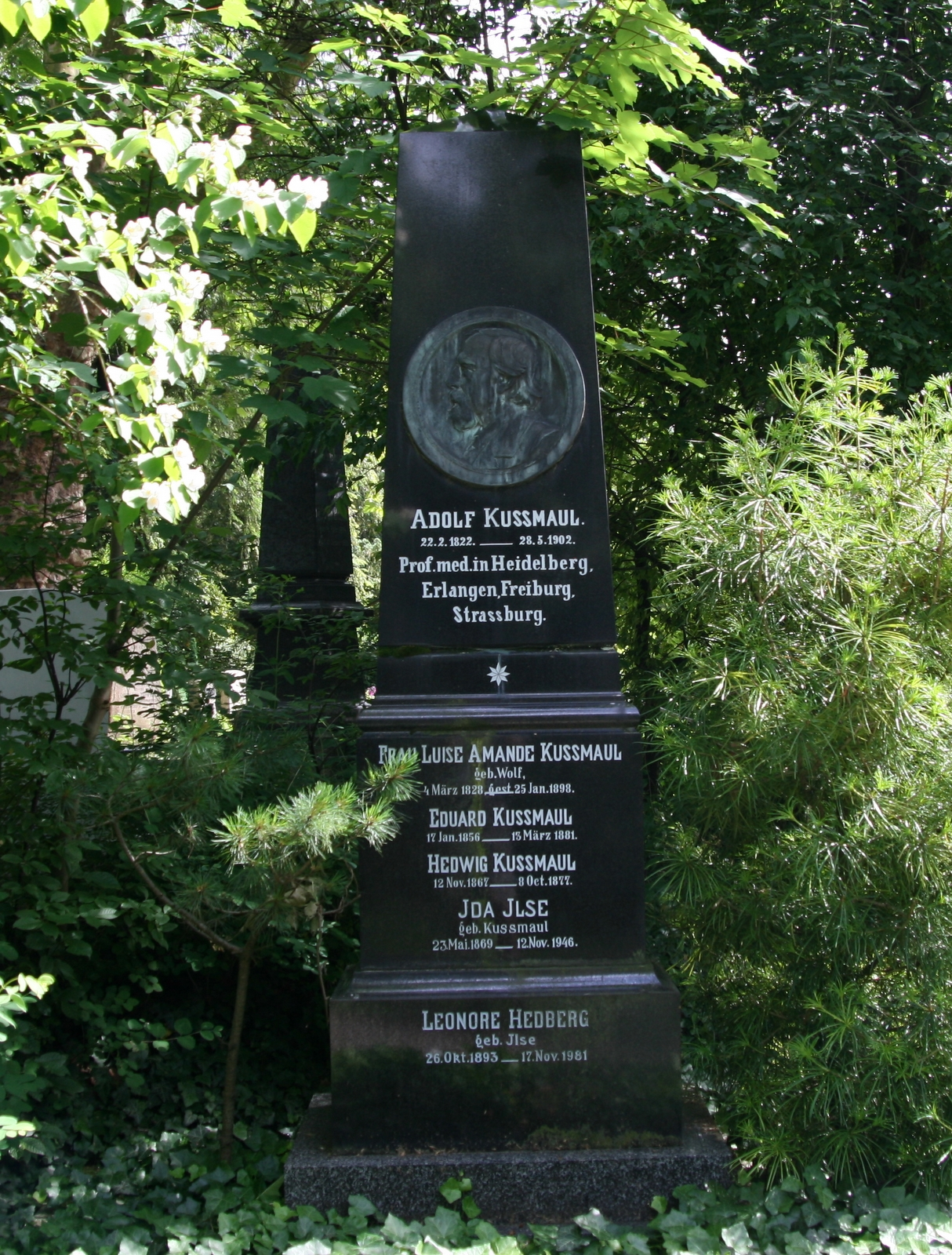 Grab von Adolf Kußmaul auf dem Bergfriedhof in Heidelberg